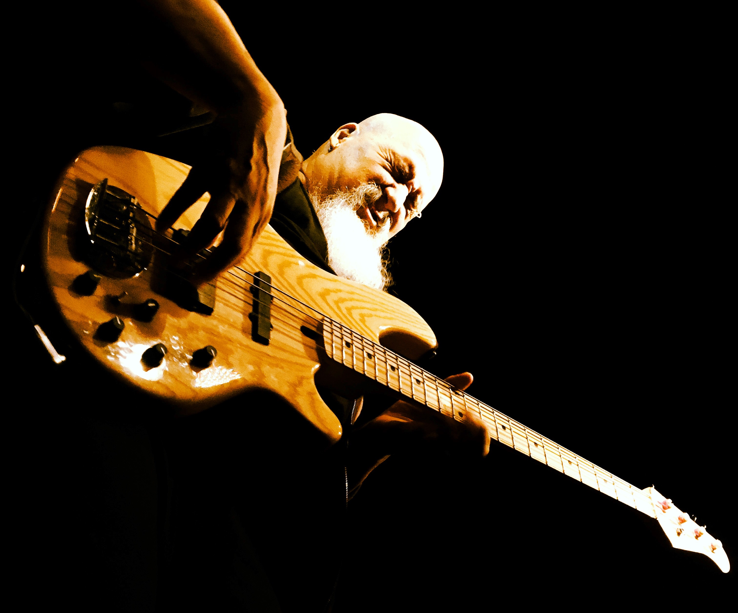 Leo Bei - Bass-Solo - Musiklokal "local" in Wien 2019